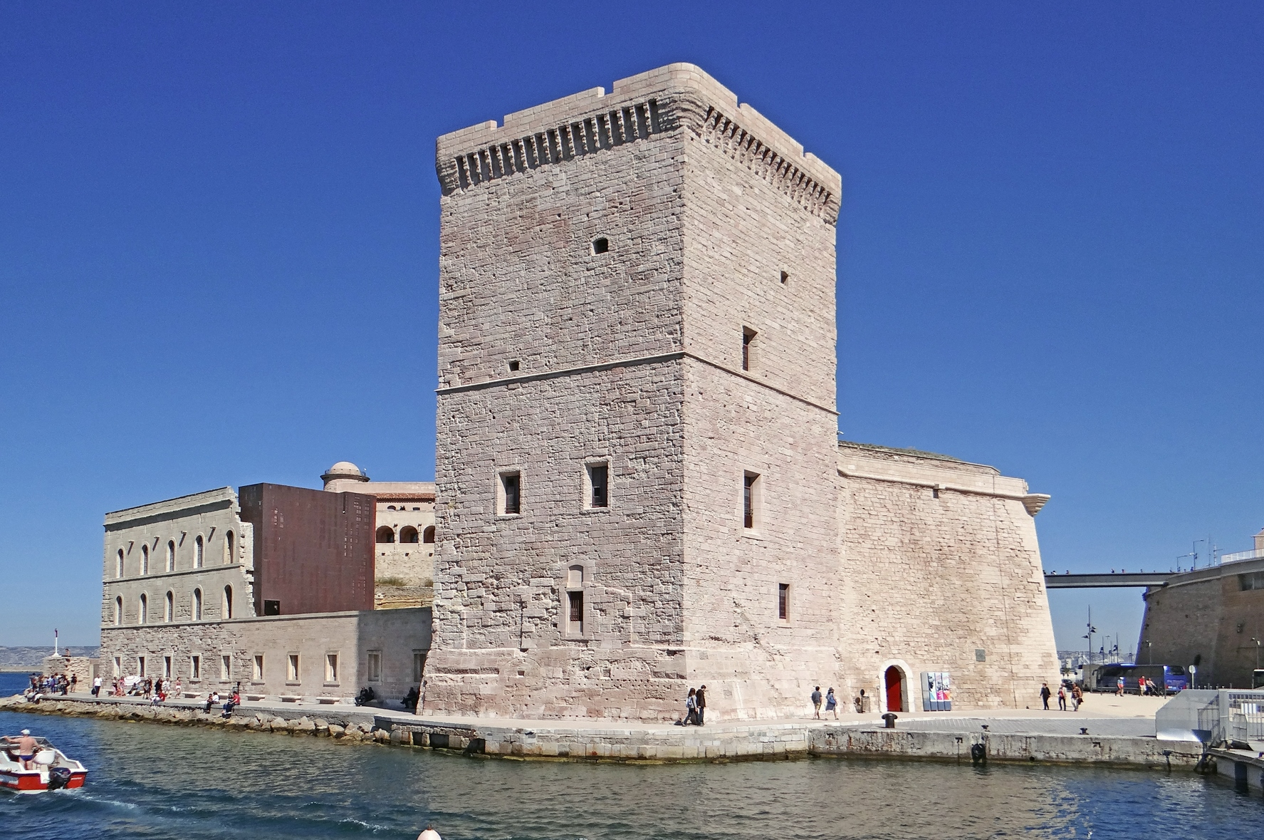 Le fort Saint-Jean avec au premier plan la tour du Roi René La vue est prise depuis le Vieux-Port sur un bateau Le MuCEM est un musée national, établissement public sous tutelle du ministère de la culture et de la communication, issu de l'ancien musée national des arts et traditions populaires situé au bois de Boulogne à Paris et aujourd'hui fermé (MNATP). Article de Wikipedia sur le fort Saint-Jean Site du Musée des Civilisations de l'Europe et de la Méditerranée (MuCEM)